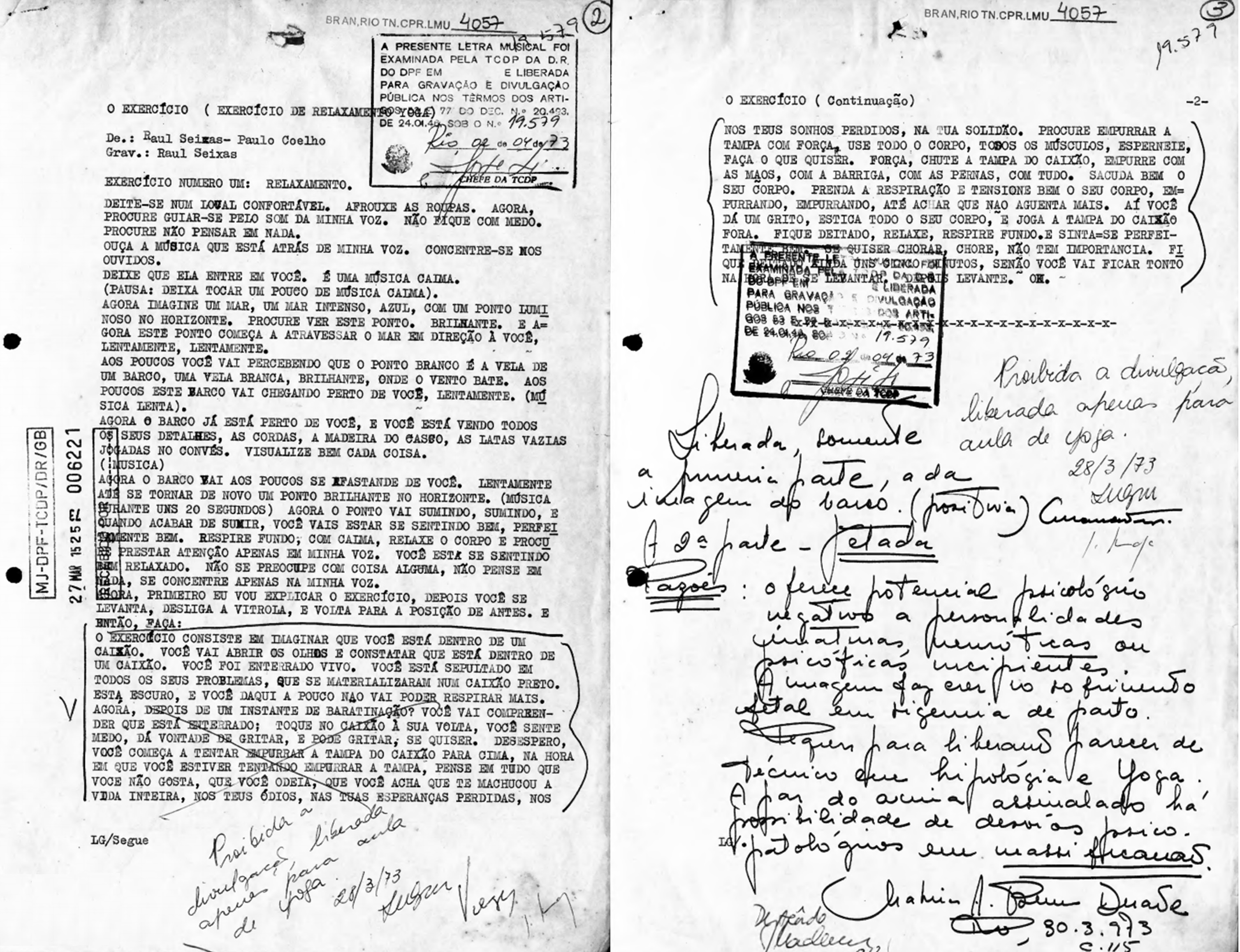 Documento da Censura avaliando a música “O Exercício”, de Raul Seixas.. Serviço de Censura e Diversões Públicas.